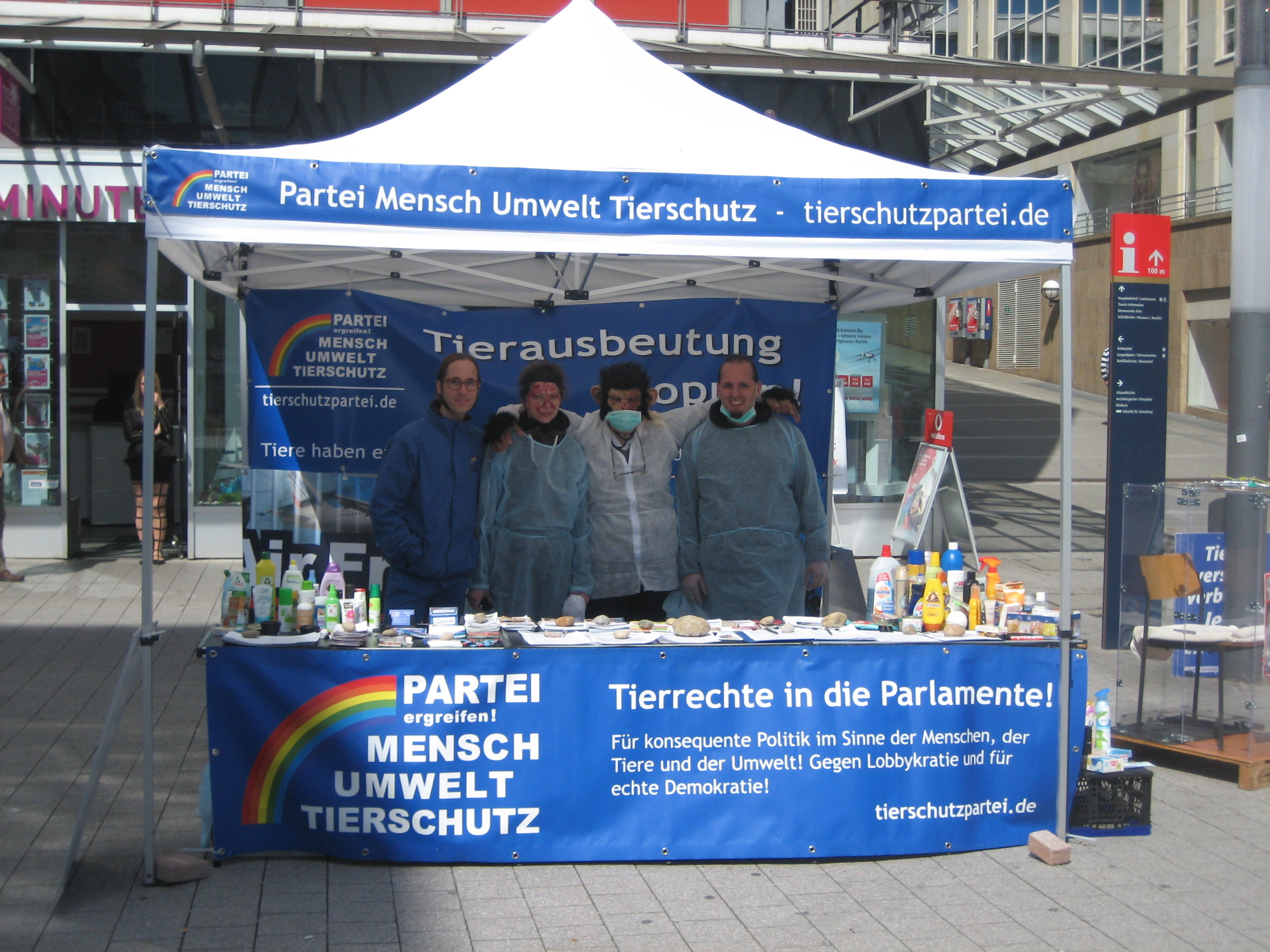 Infostand der Tierschutzpartei in Pforzheim am 18. April 2015, links im Bild ist Matthias Ebner zu sehen